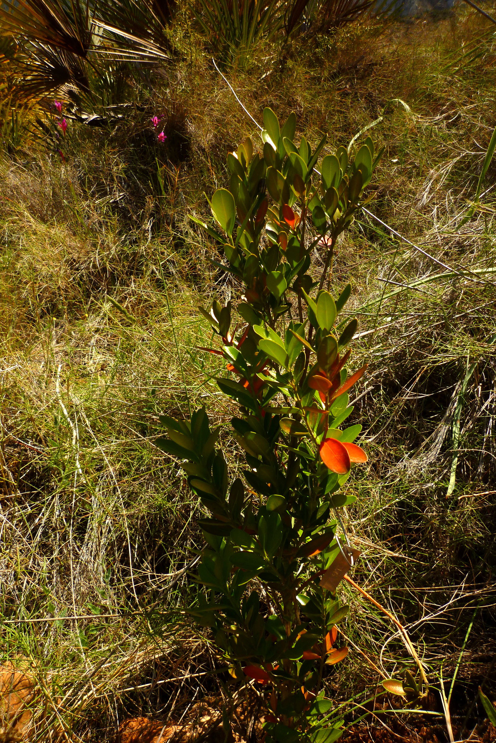 Buxus balearica (Boj balear) de repoblación en Peñas Blancas, Cartagena, España.